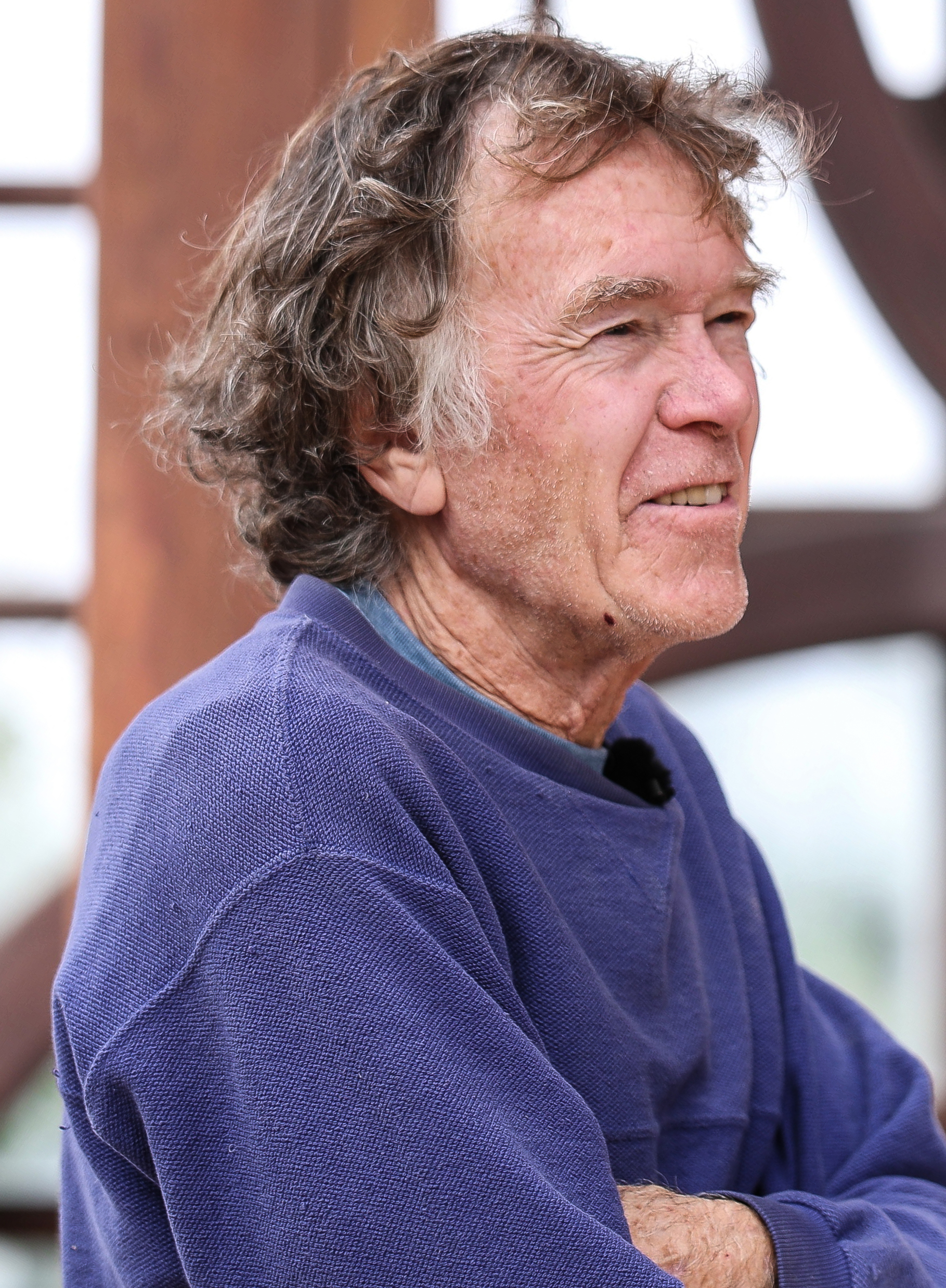 Will Steger